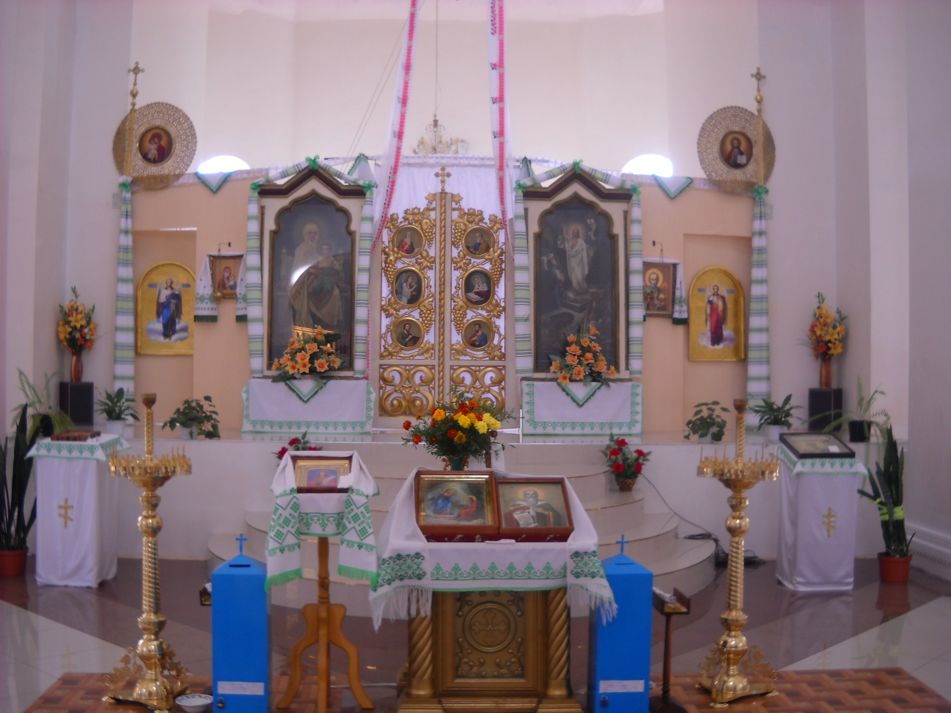 Ikonostas w soborze Zwiastowania w Kowlu